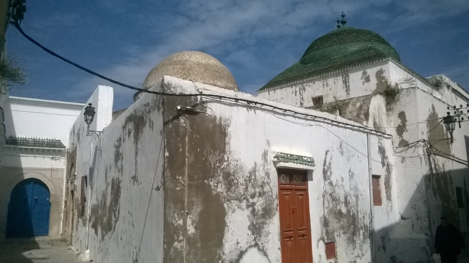 La médina de Tunis مدينة تونس العتيقة